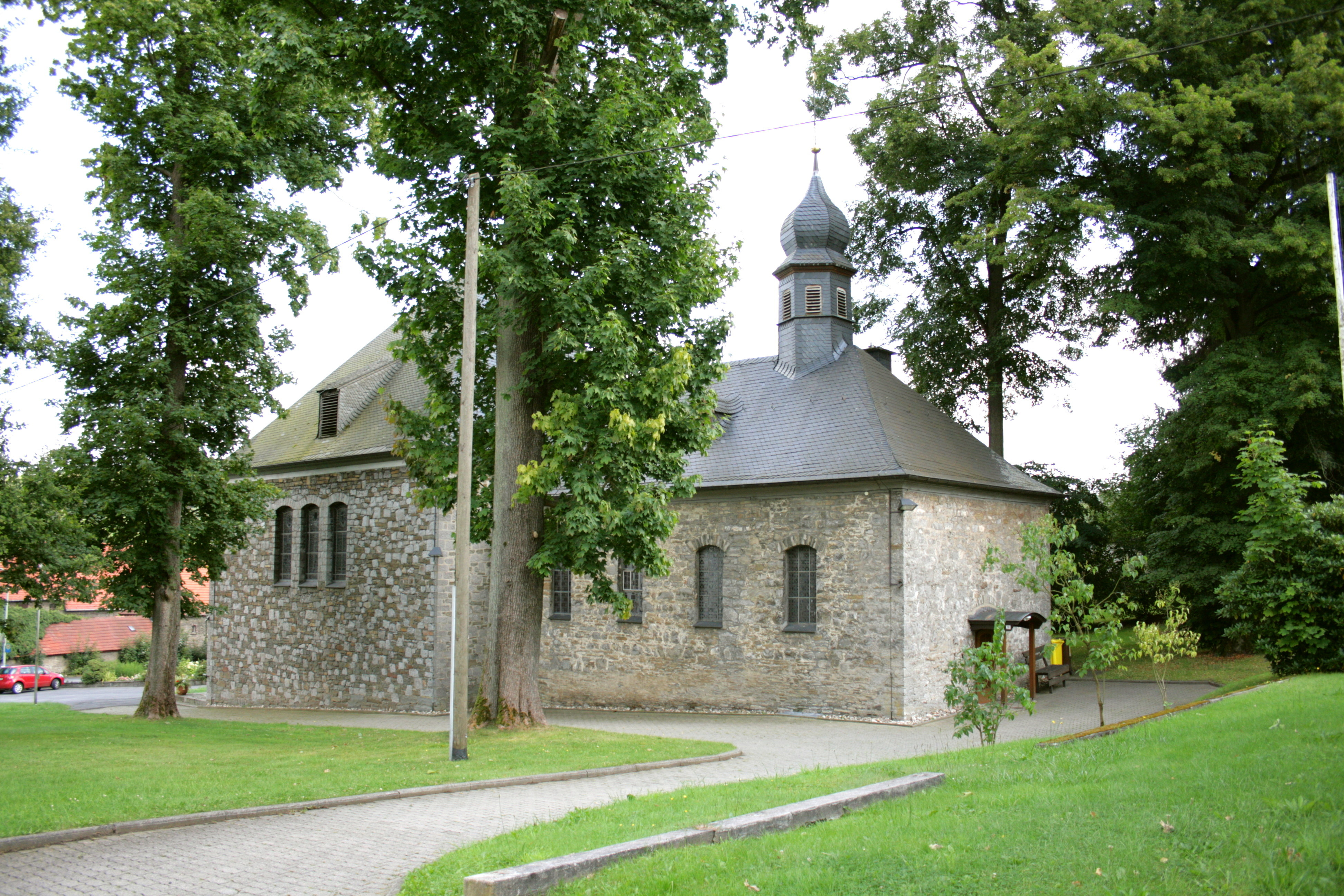 Sankt Georg, Küntroper Straße in Neuenrade-Küntrop